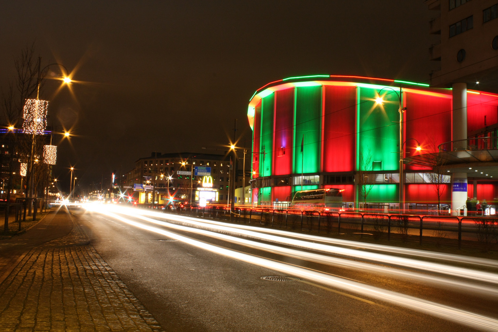 Scandinavium, Göteborg, at night